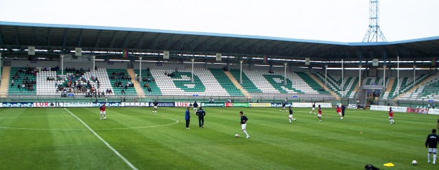 Лекоранский городской стадион